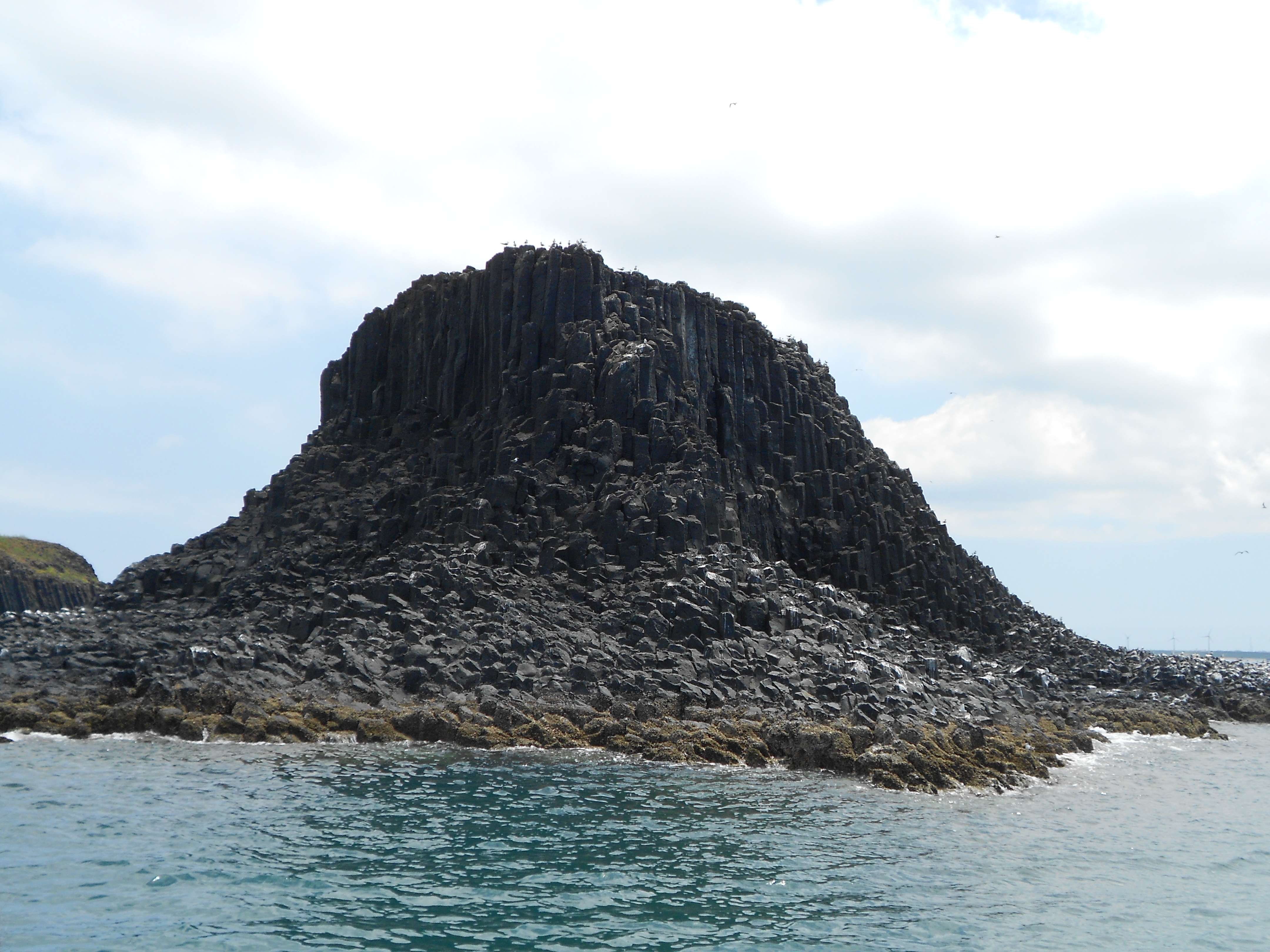 澎湖玄武岩自然保留區。